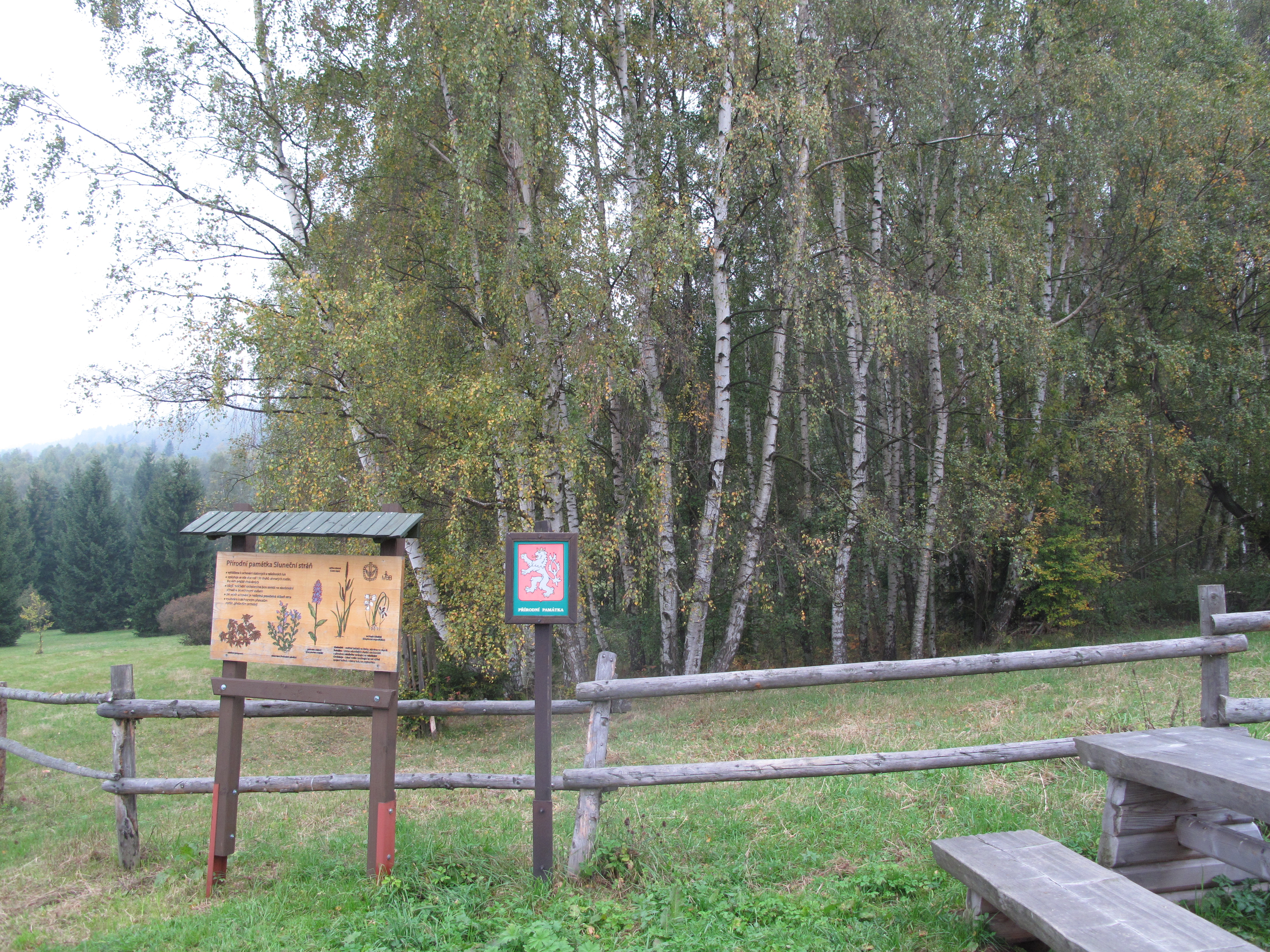 Přírodní památka Slunečná stráň